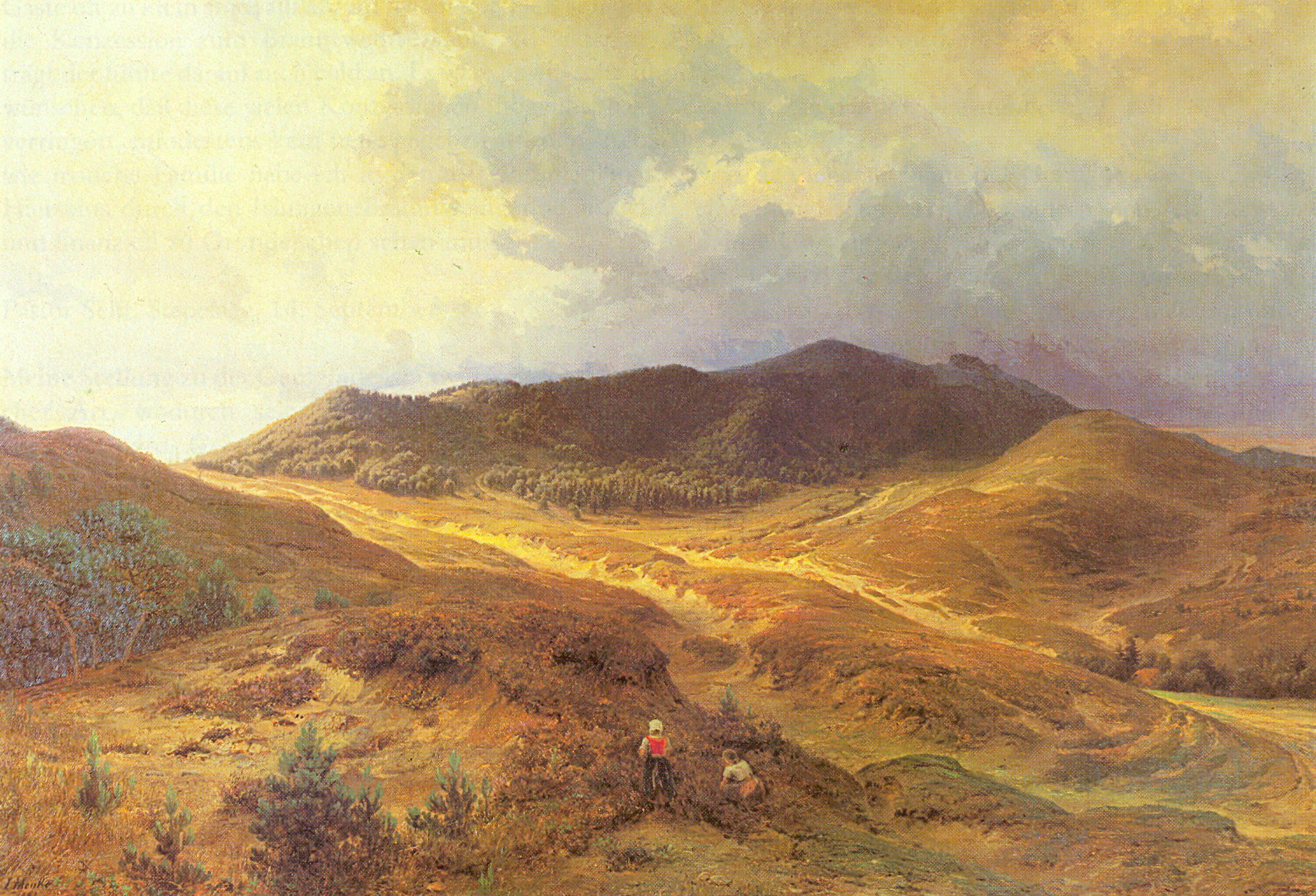 Zitiert aus der Bildbeschreibung des unten genannten Buchs: Ölgemälde von Ludwig Menke aus dem Jahre 1864 (Detmold, Dr. Armin Prinz zur Lippe).